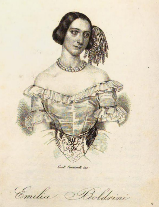 Dessin de Gaetano Cornienti dans Strenna teatrale europea, tome 7, p. 278, publié en 1844